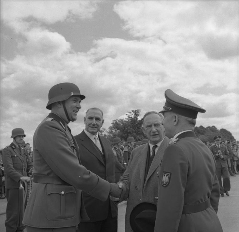 10 jähriges Bestehen des BGS: Vorbeimarsch einer mot. Einheit Lübeck 2. von rechts: Hans Ritter von Lex